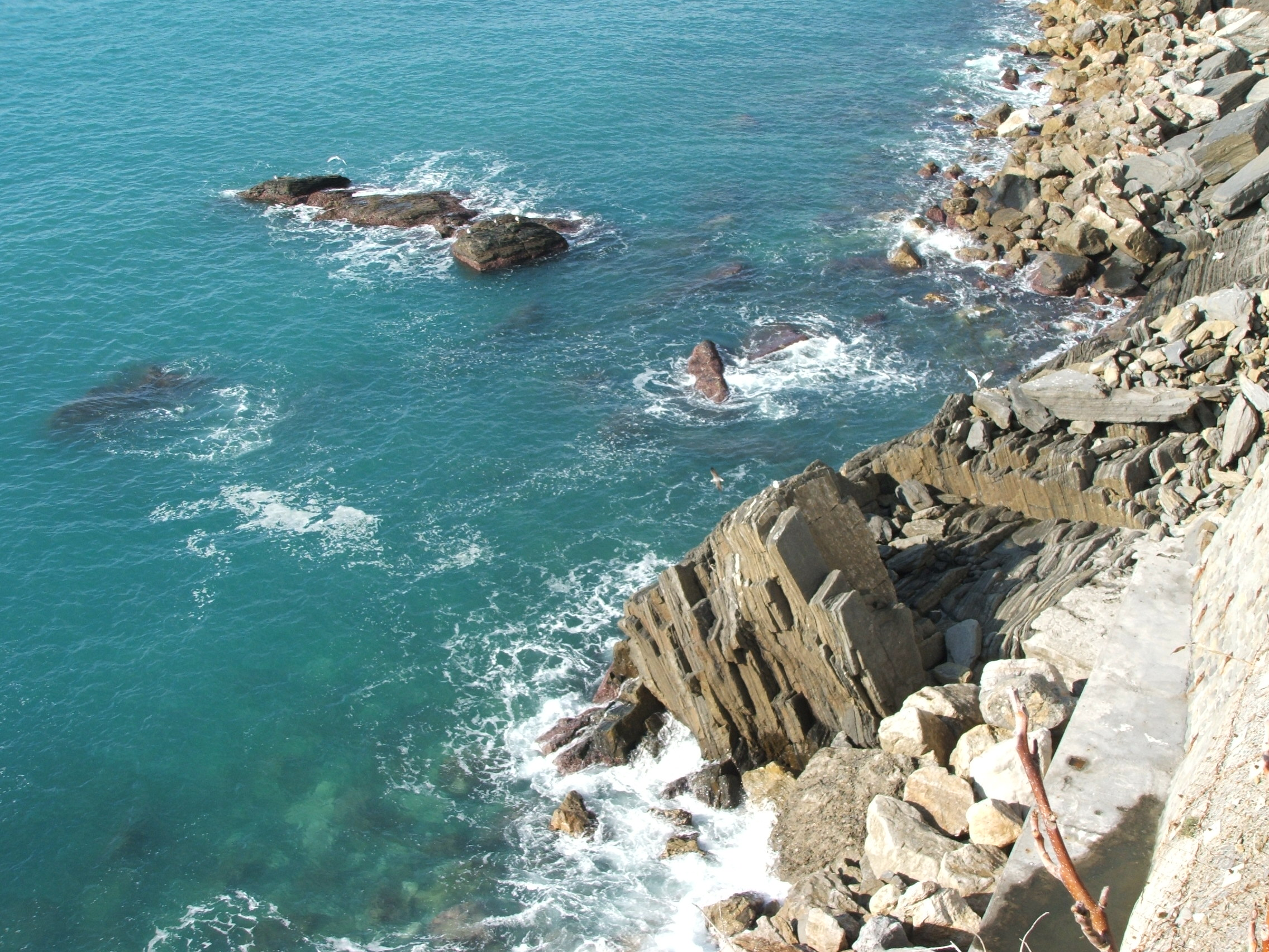 Immagine dalle Cinque Terre: Via dell'Amore Riomaggiore